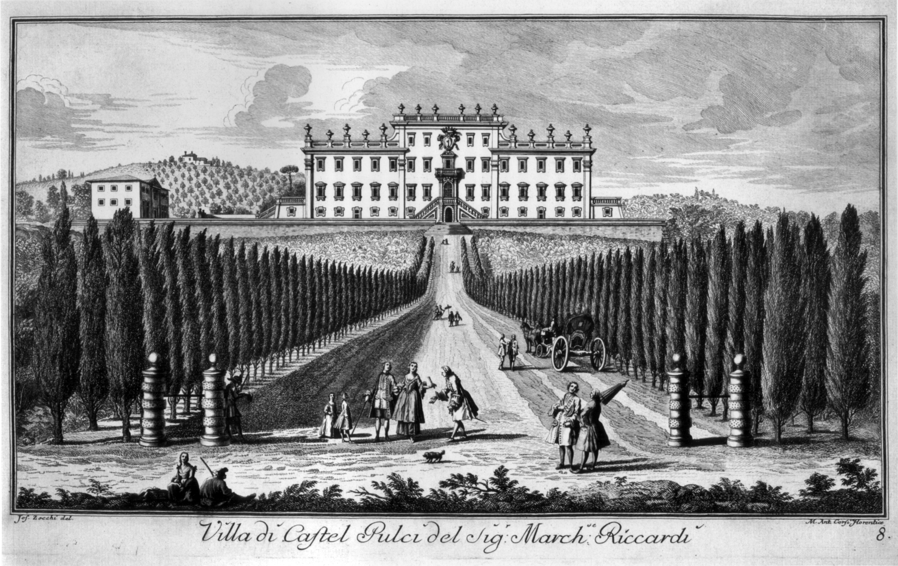 Zocchi, ville 10 castelpulci